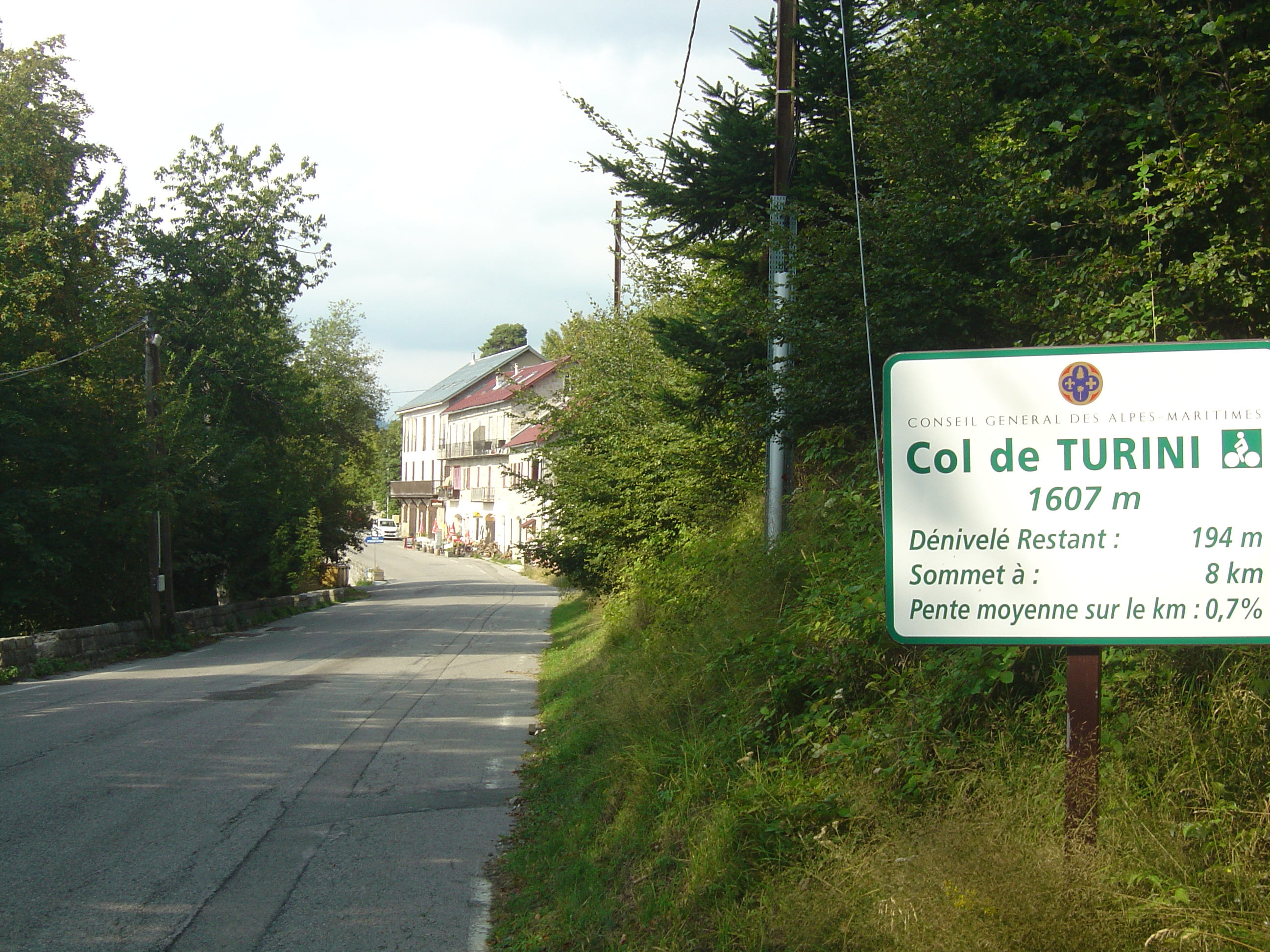 Ascension du col de Turini par le versant Sud-Ouest (départ de L'Escarène). Entrée de Peïra-Cava. Km 18 environ presque plat